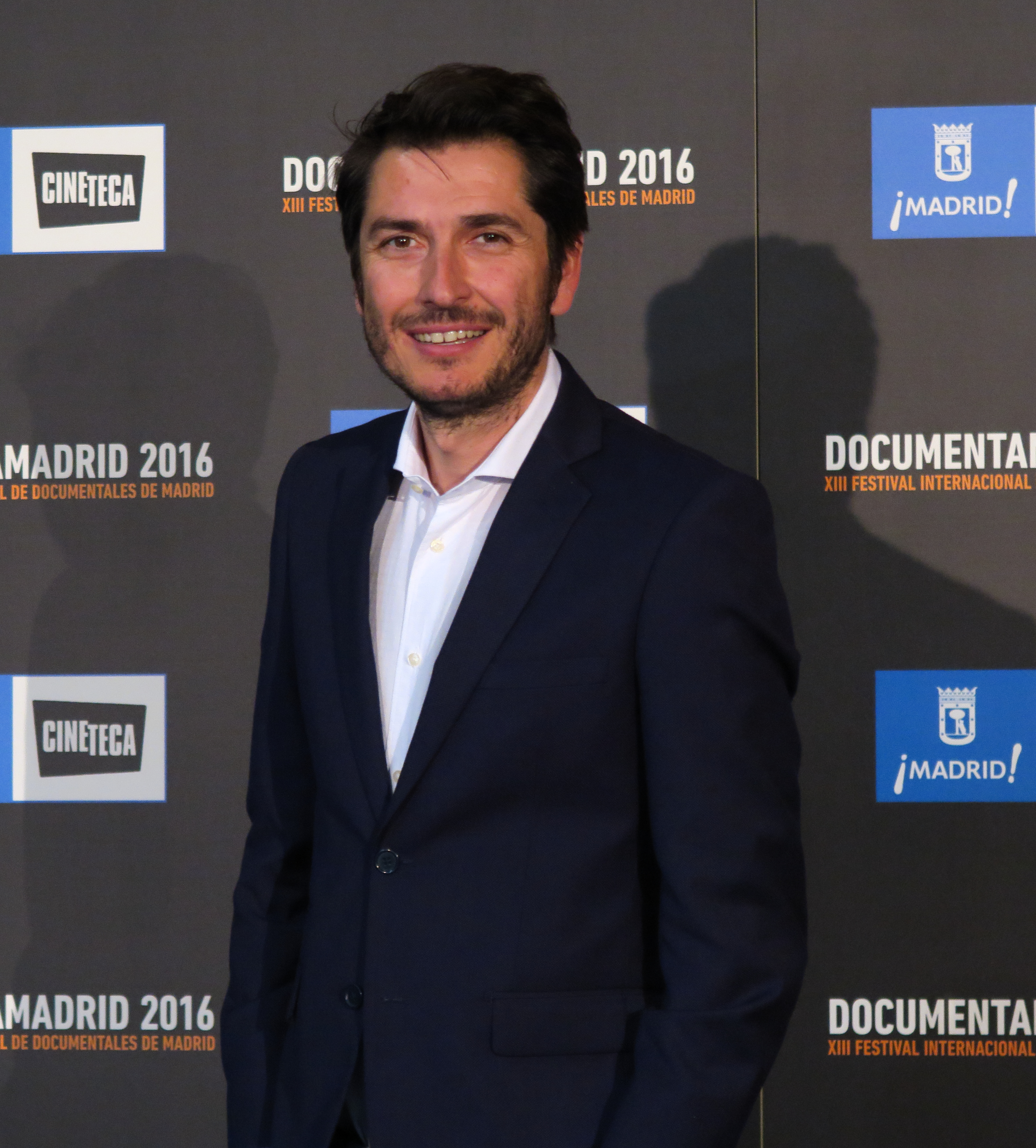 Carlos del Amor, en DocumentaMadrid 2016